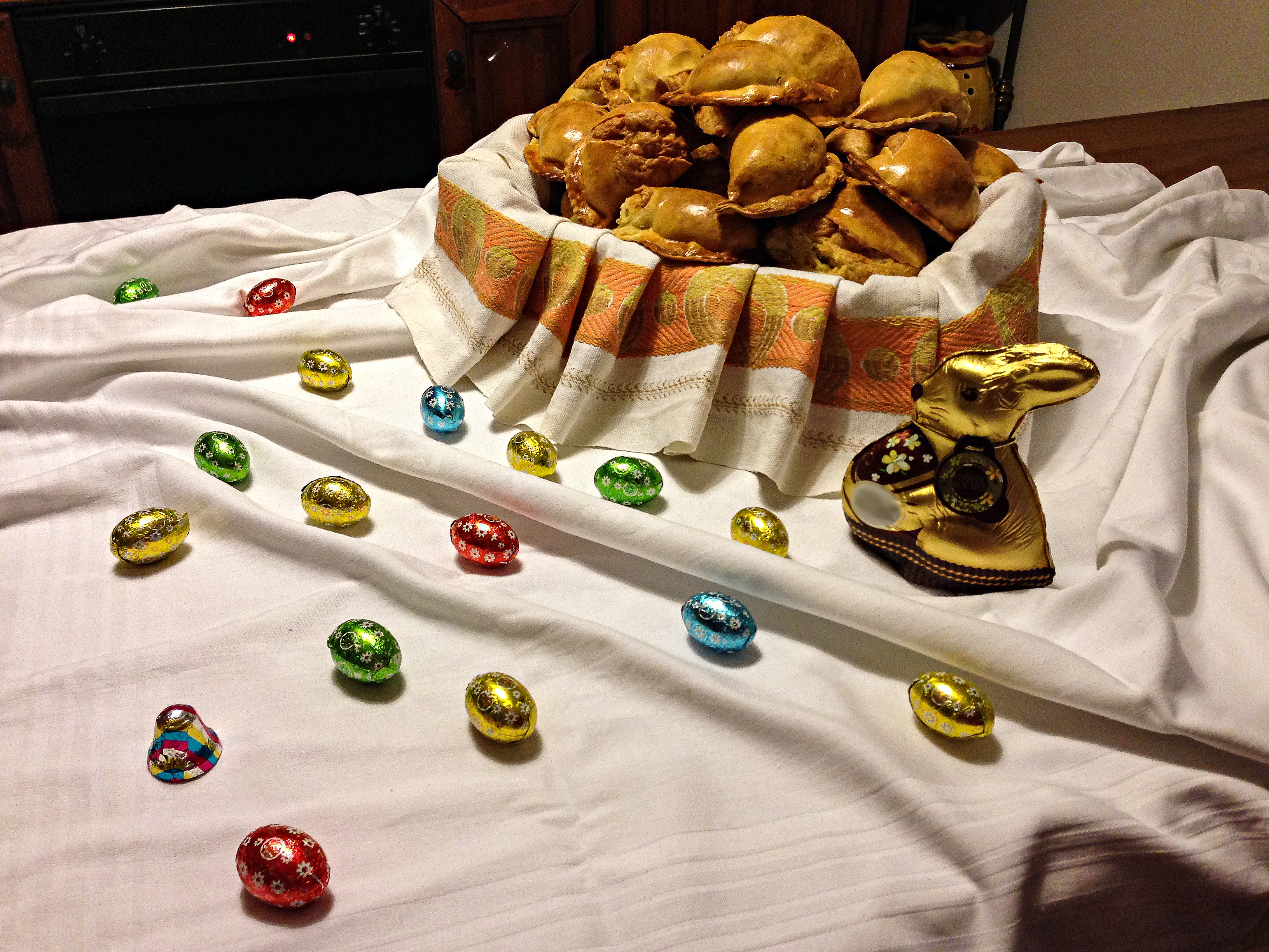 I Canescioni (cascellune), prodotto tipico pasquale del nord Campania e Ciociaria.